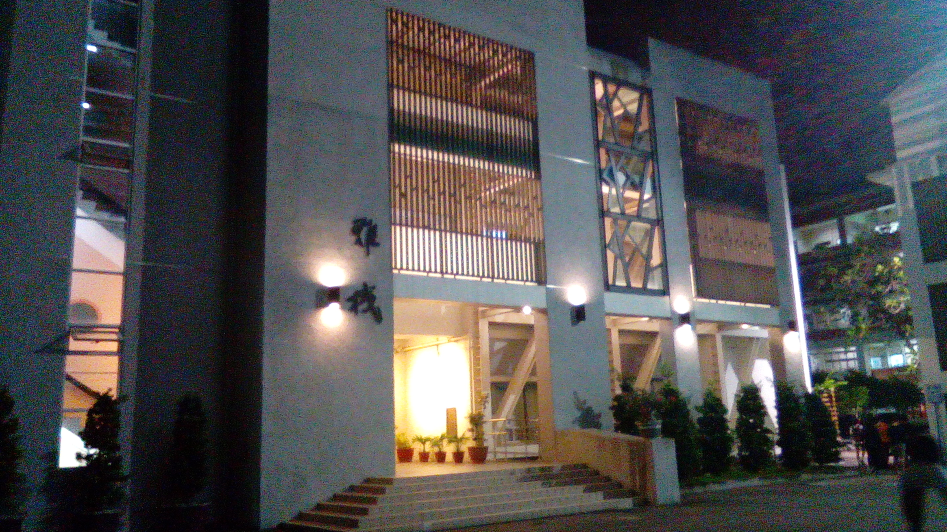 同上